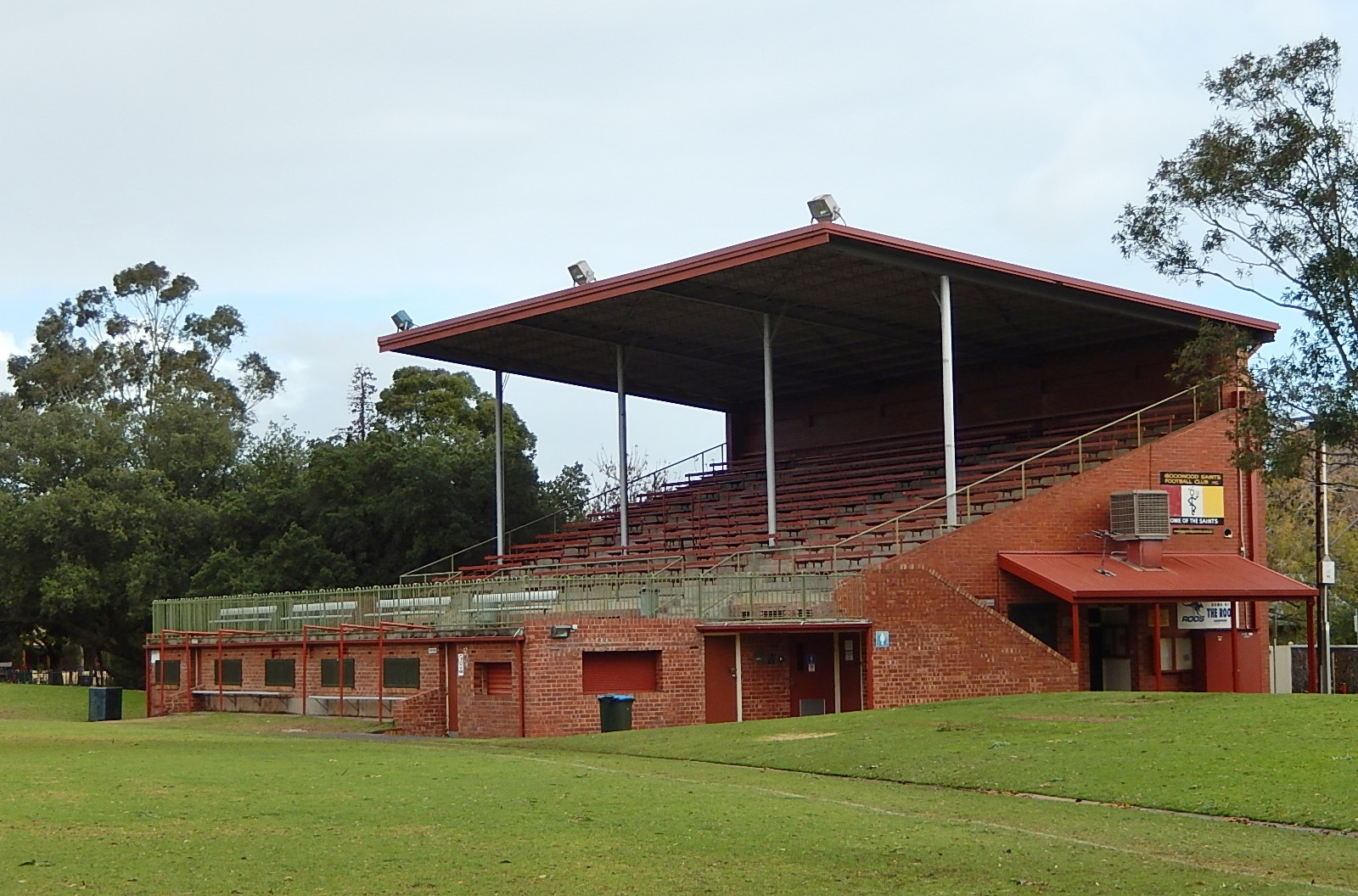 Grandstand at Goodwood Oval